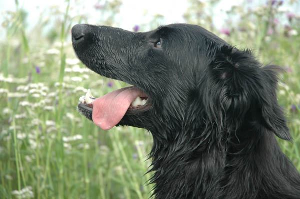 Altdeutscher Hütehund, Schwarzer